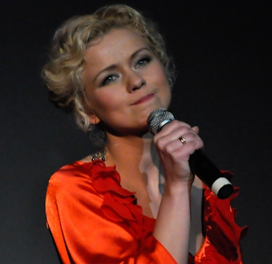 Dita Lūriņa, Latvian actress